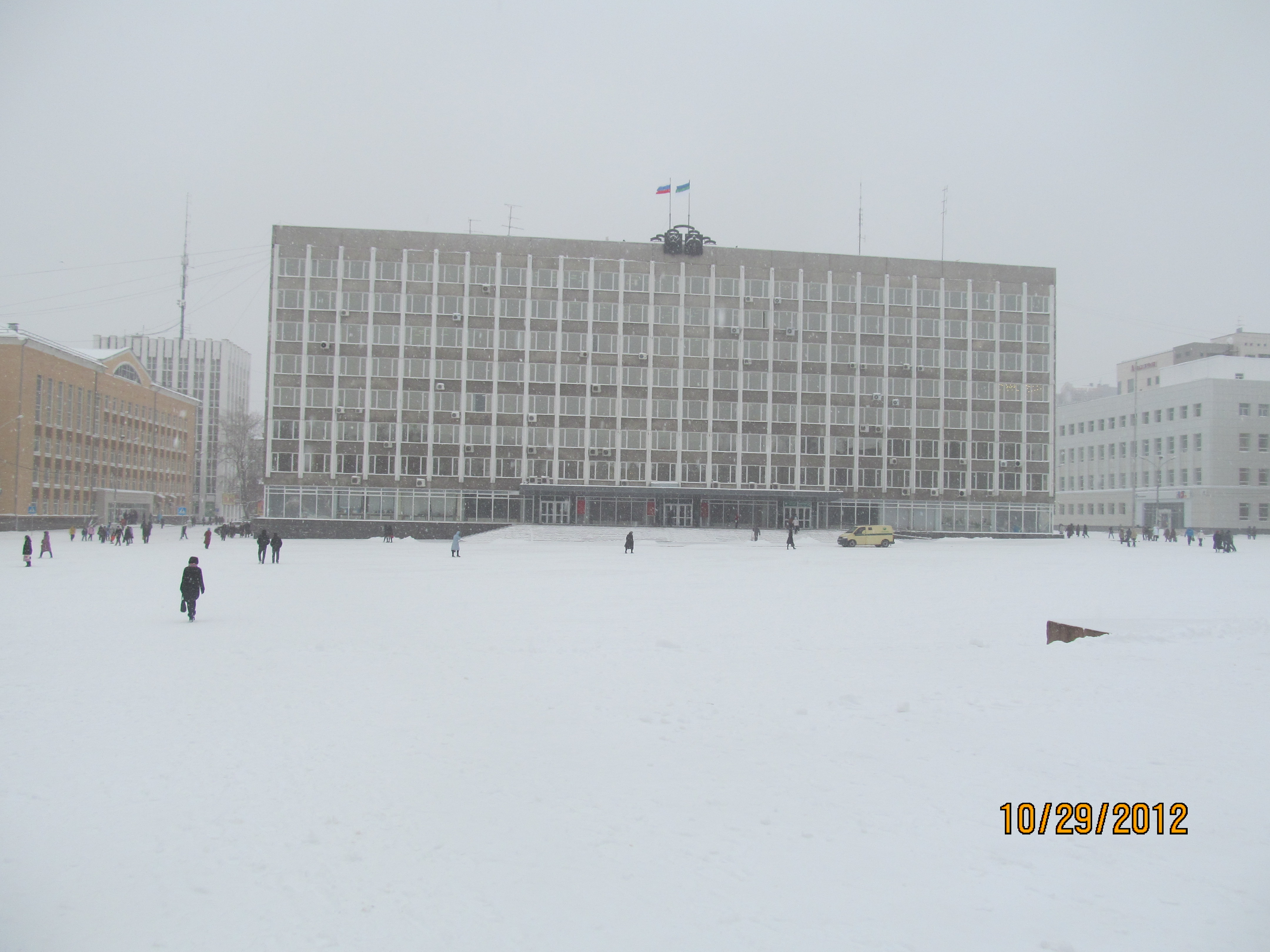 Стефановская площадь зимой.